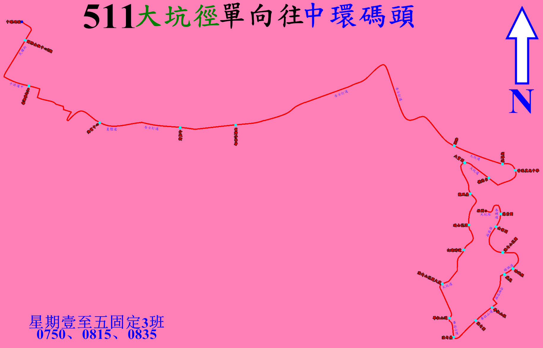 中文（香港）: 城巴511線的走線圖